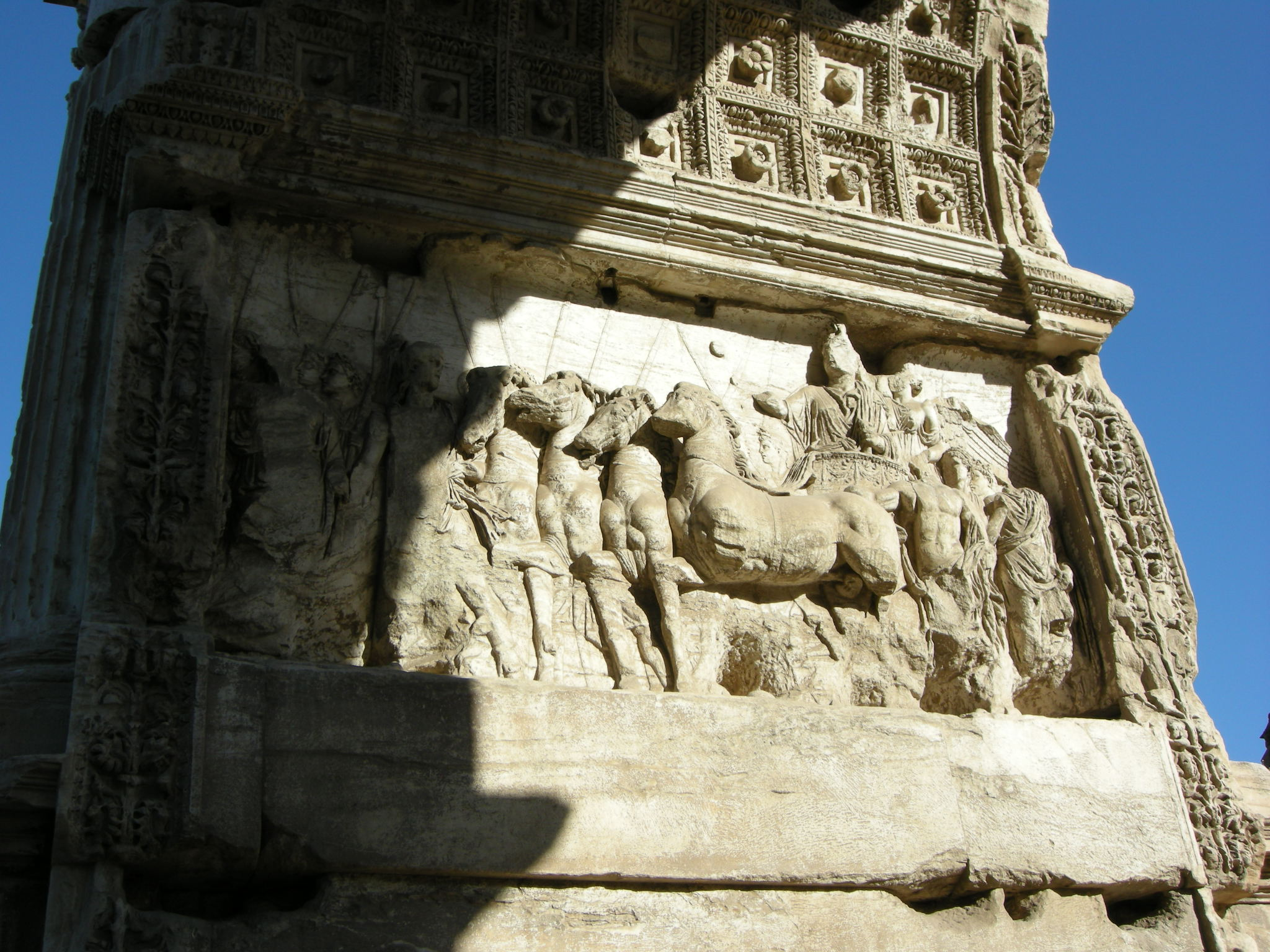 Arco di tito, rilievo della quadriga